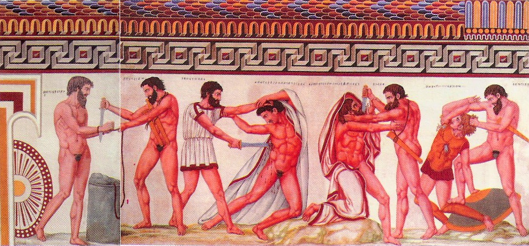 Copie des fresque de la tombe François par Carlo Ruspi (XIXe siècle) sur le site